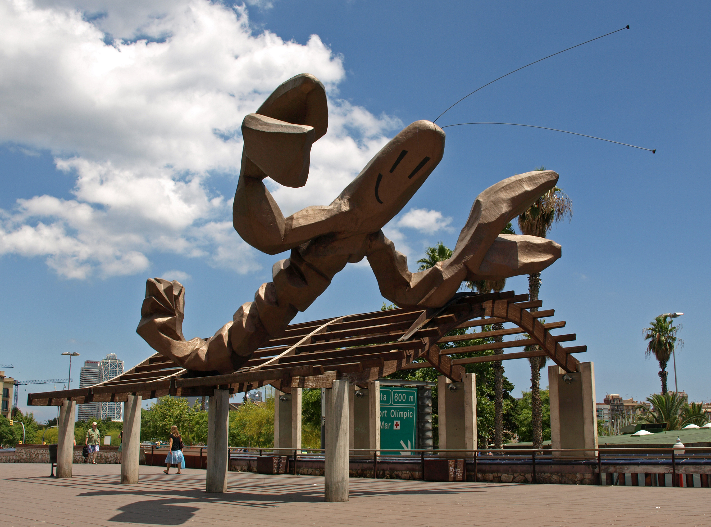 La Gamba (Javier Mariscal, 1987)